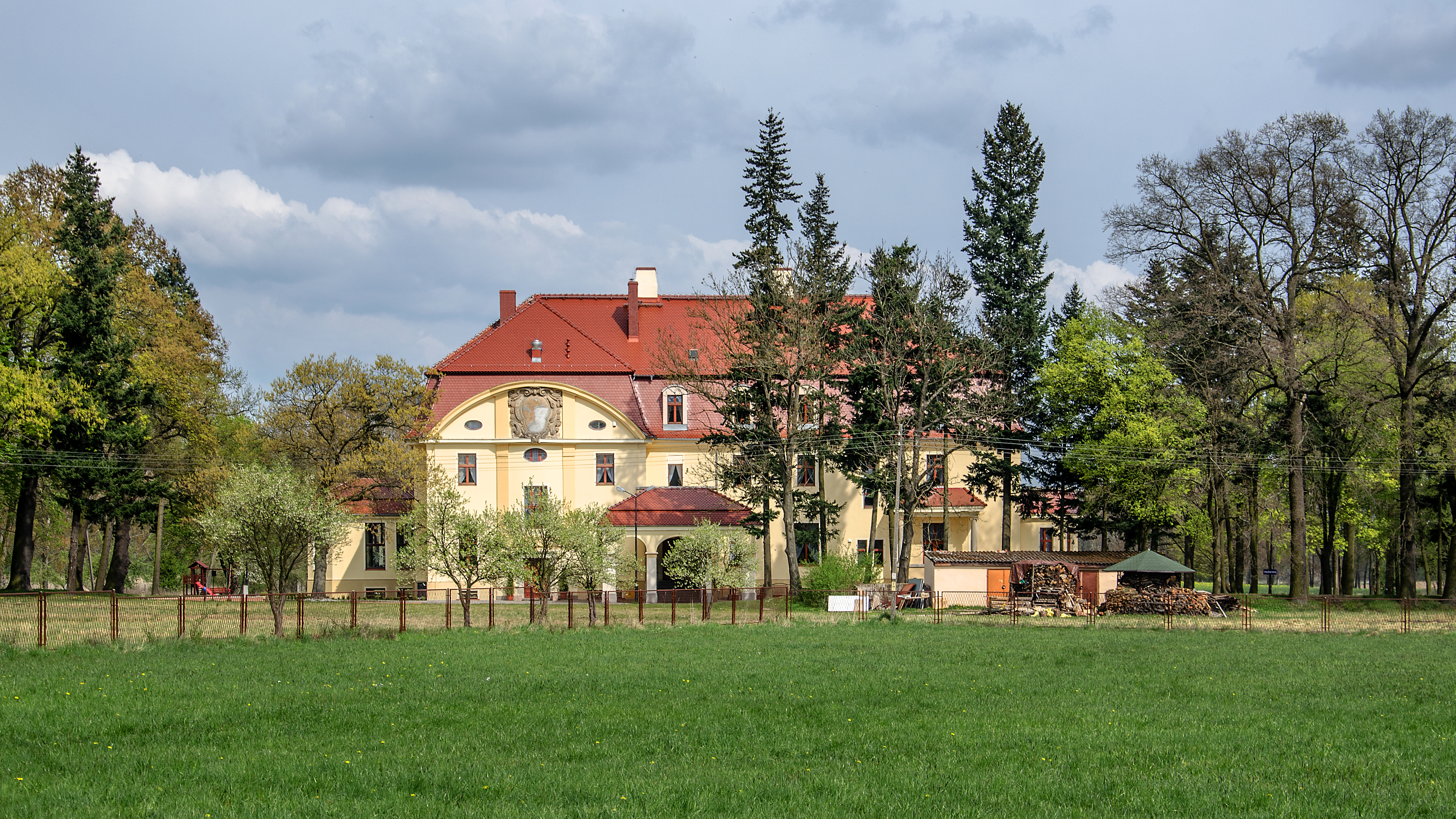 Radomiłów, pałac, 1907